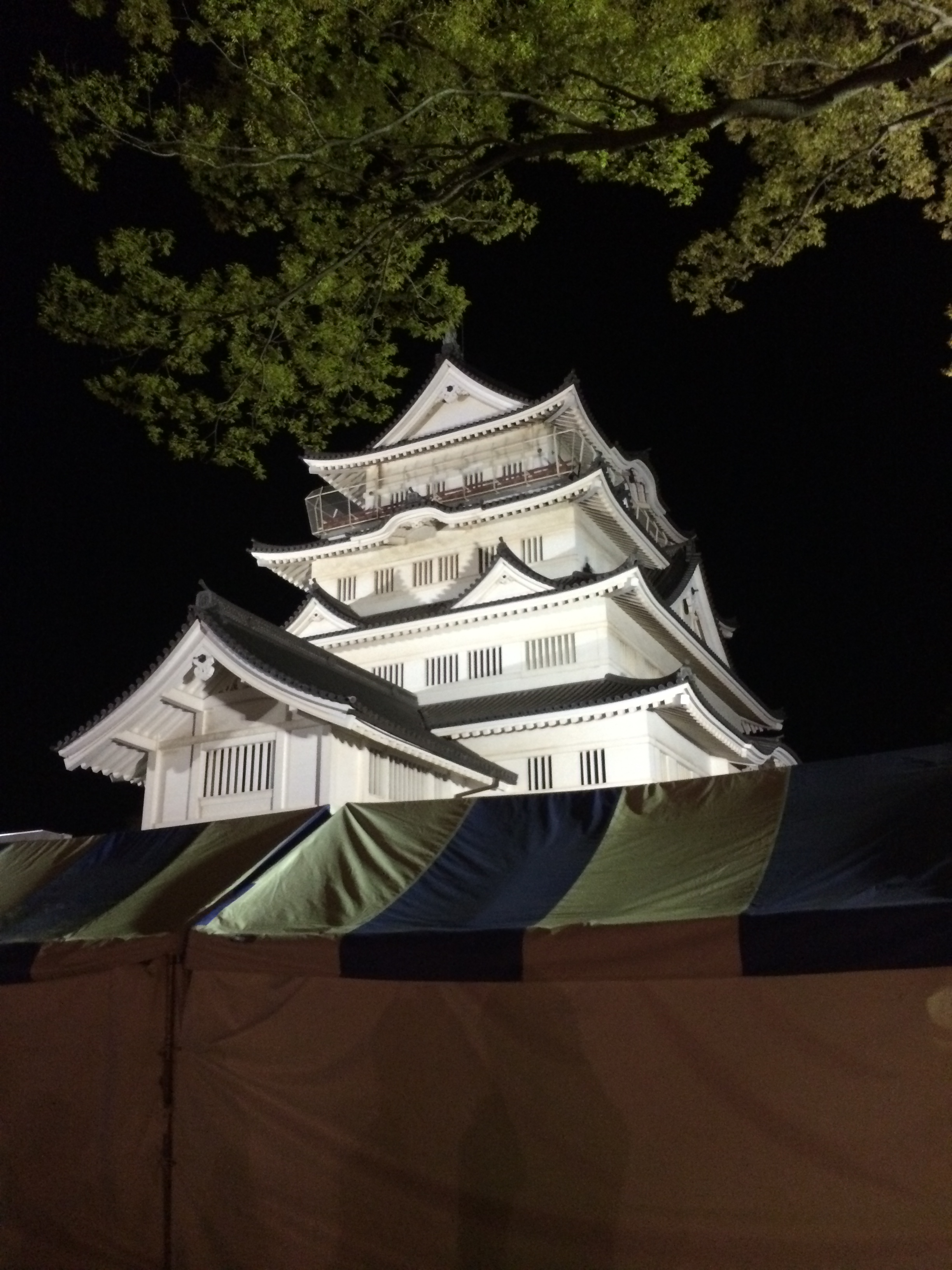 桜祭り•千葉城